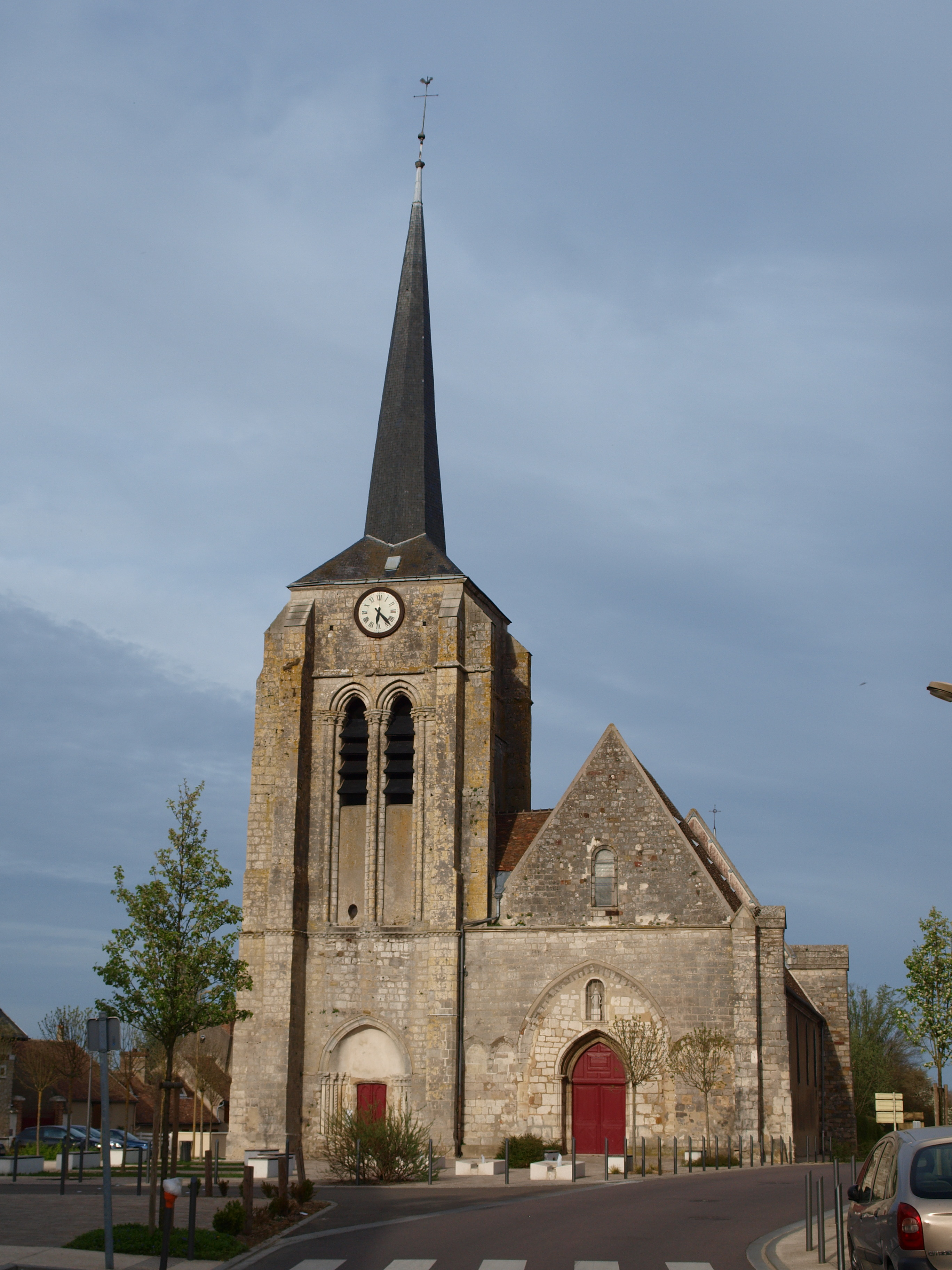 Chéroy (Yonne, France) ; l'église